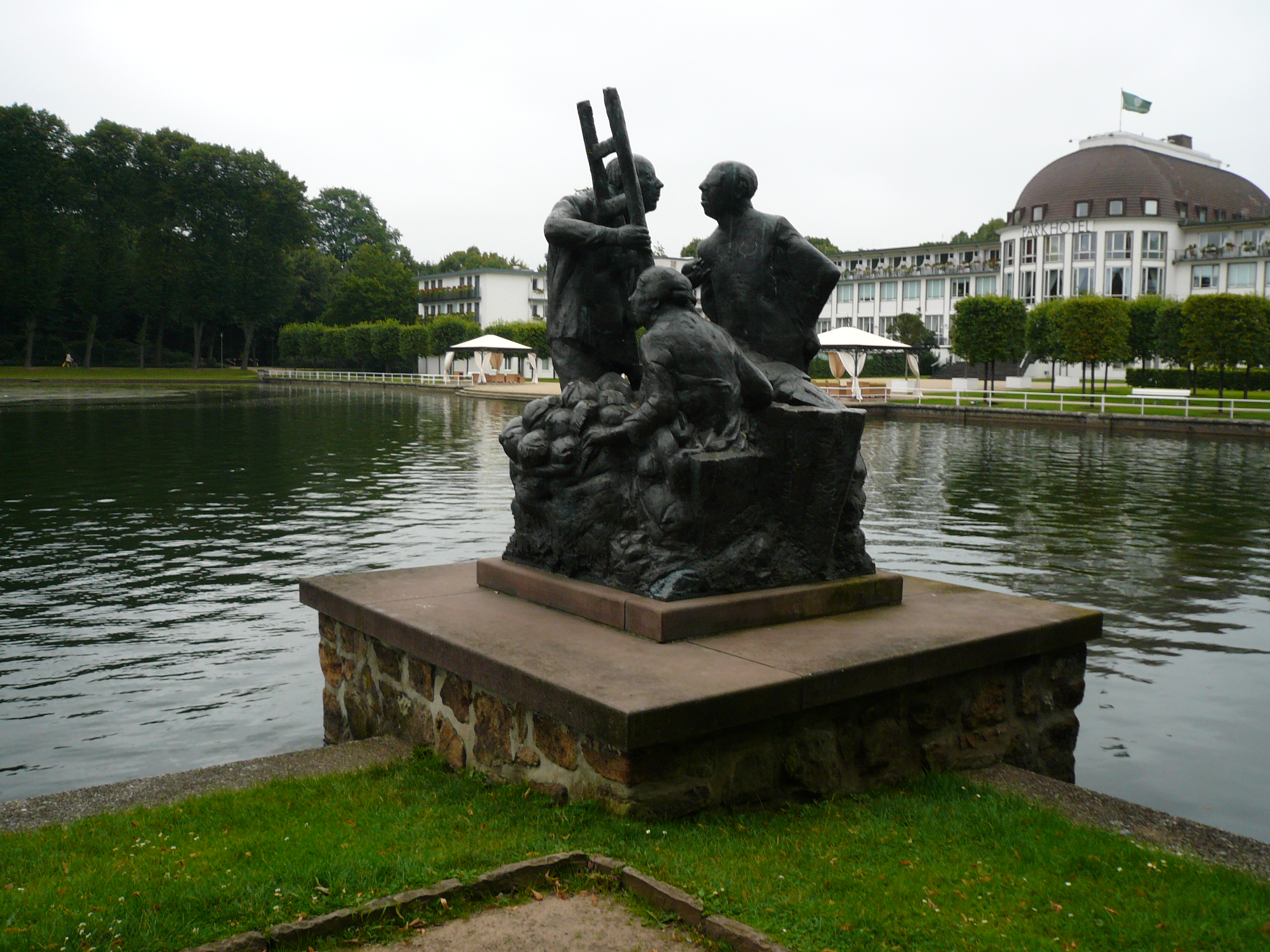 Skulptur am Hollersee in Bremen